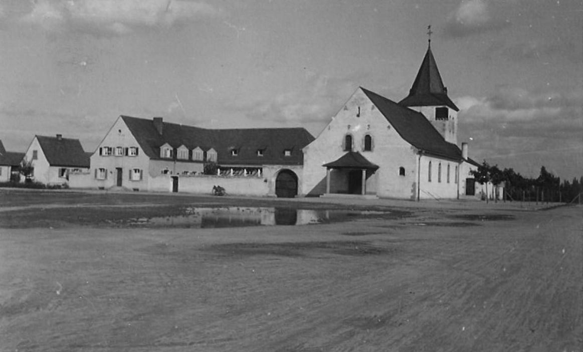 Die alte Kirche von St. Konrad, Speyer-Nord, Speyer. Aus unserem Familienalbum, meinem Lieblingserbstück. Mit dieser Kirche, inzwischen ersetzt durch eine große moderne Betonkirche, identifizieren sich wohl immer noch alle Siedler, die das Kirchlein noch kennen. Und trauern ihm nach. Links befindet sich das Schwesternhaus, wo oben heute der Kirchenchor übt und unten die Küche für den Pfarrsaal ist. Im Hintergrund der heutige Pfarrsaal, in dem die Schwestern die Woche über den Kindergarten betrieben. An Wochenenden fanden dort die Veranstaltungen der Pfarrgemeinde statt von den Faschingstänzen bis zum Pfarrfest und dem Weihnachtsspiel. Der Saal war auch immer der Übungsort des Männergesangverein St. Konrad, aus dem bald ein gemischter Chor wurde. Diese Gebäude und das Siedlergemeinschaftshaus sowie der Gemeindesaal der Protestanten im Eichenweg waren jahrzehntelang der gesellschaftliche Mittelpunkt der Siedlung.